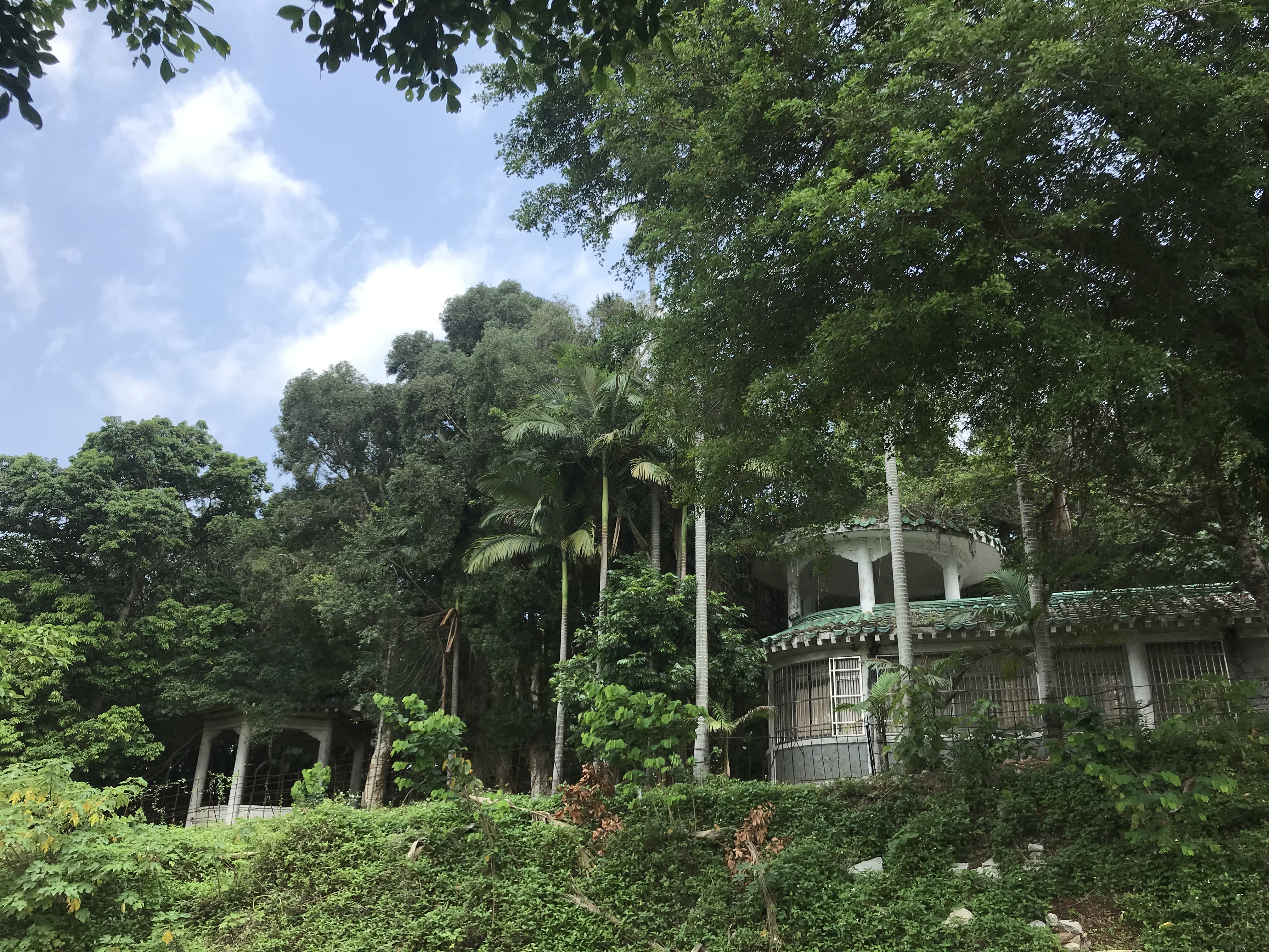 陳濟棠將軍墓園涼亭與警衛室